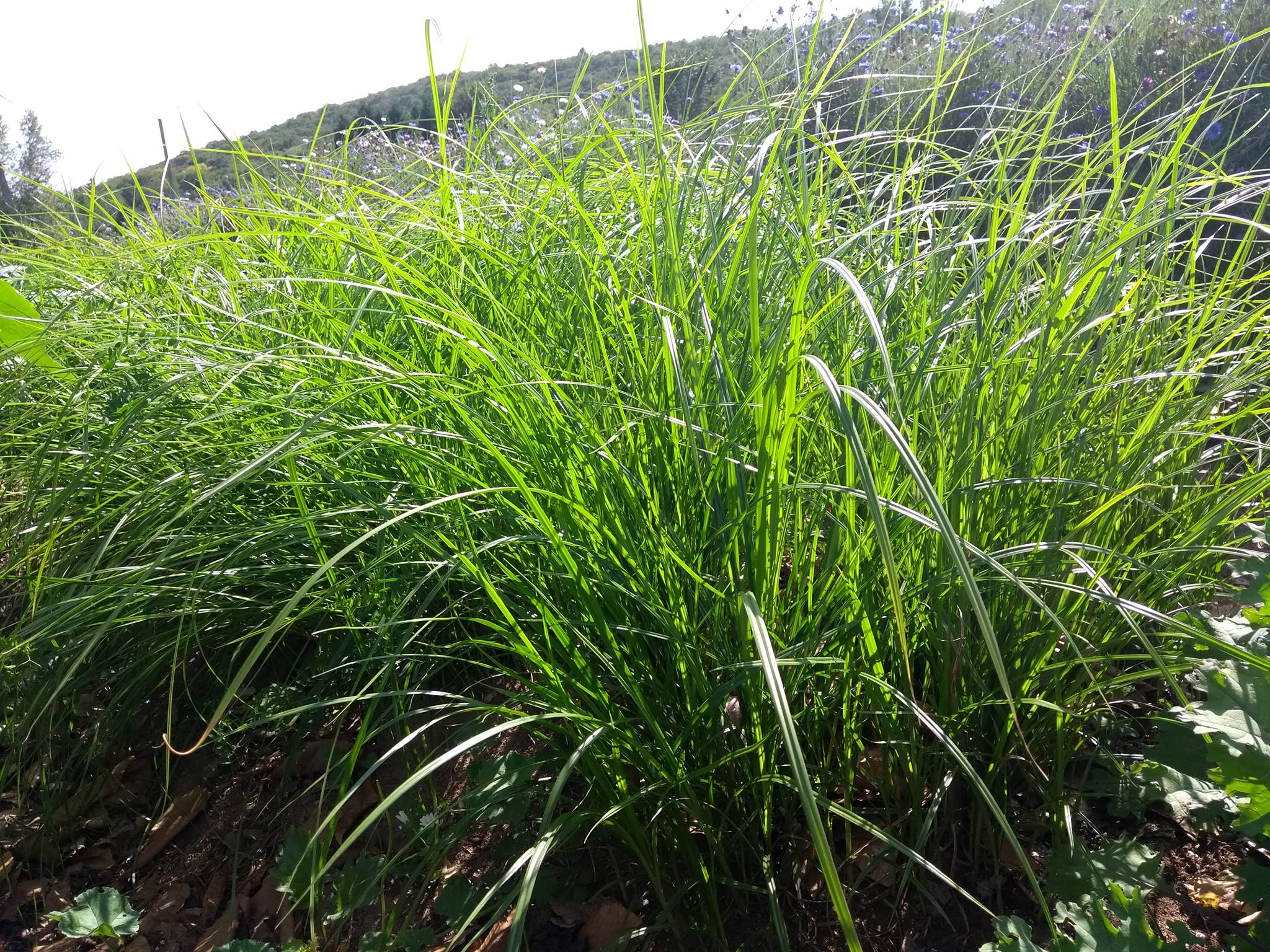 Culture du souchet comestible